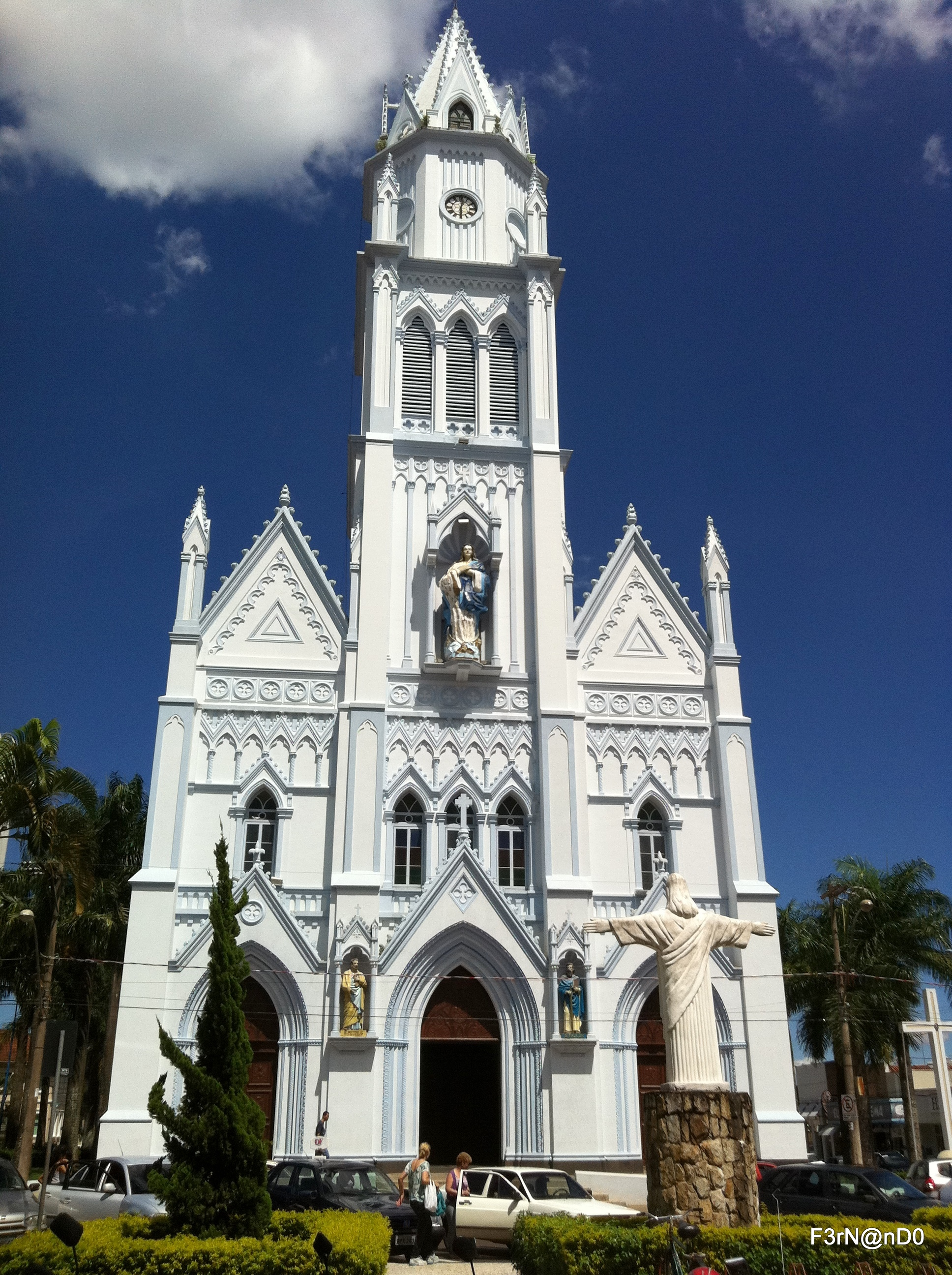 Centro, Franca - São Paulo, Brasil